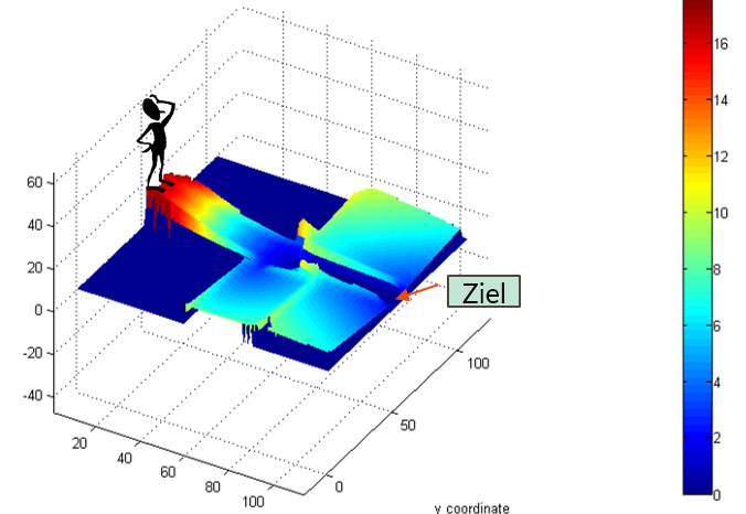 crowd simulation scheme: vector field